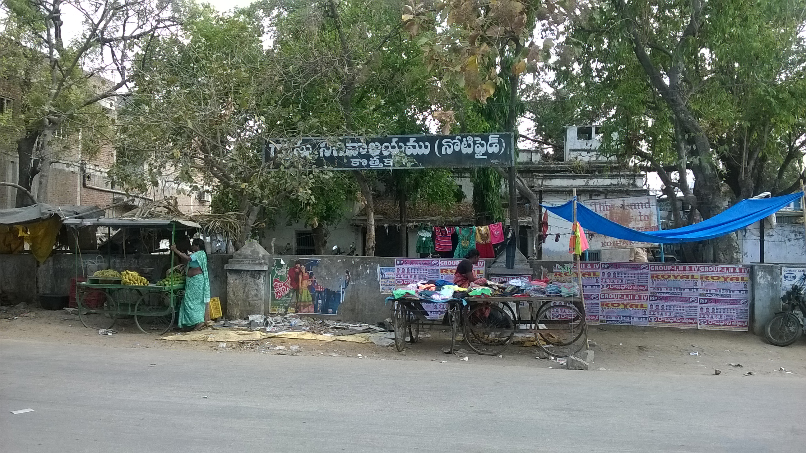 గ్రామ పంచాయతీ కార్యాలయం, కొత్తకోట